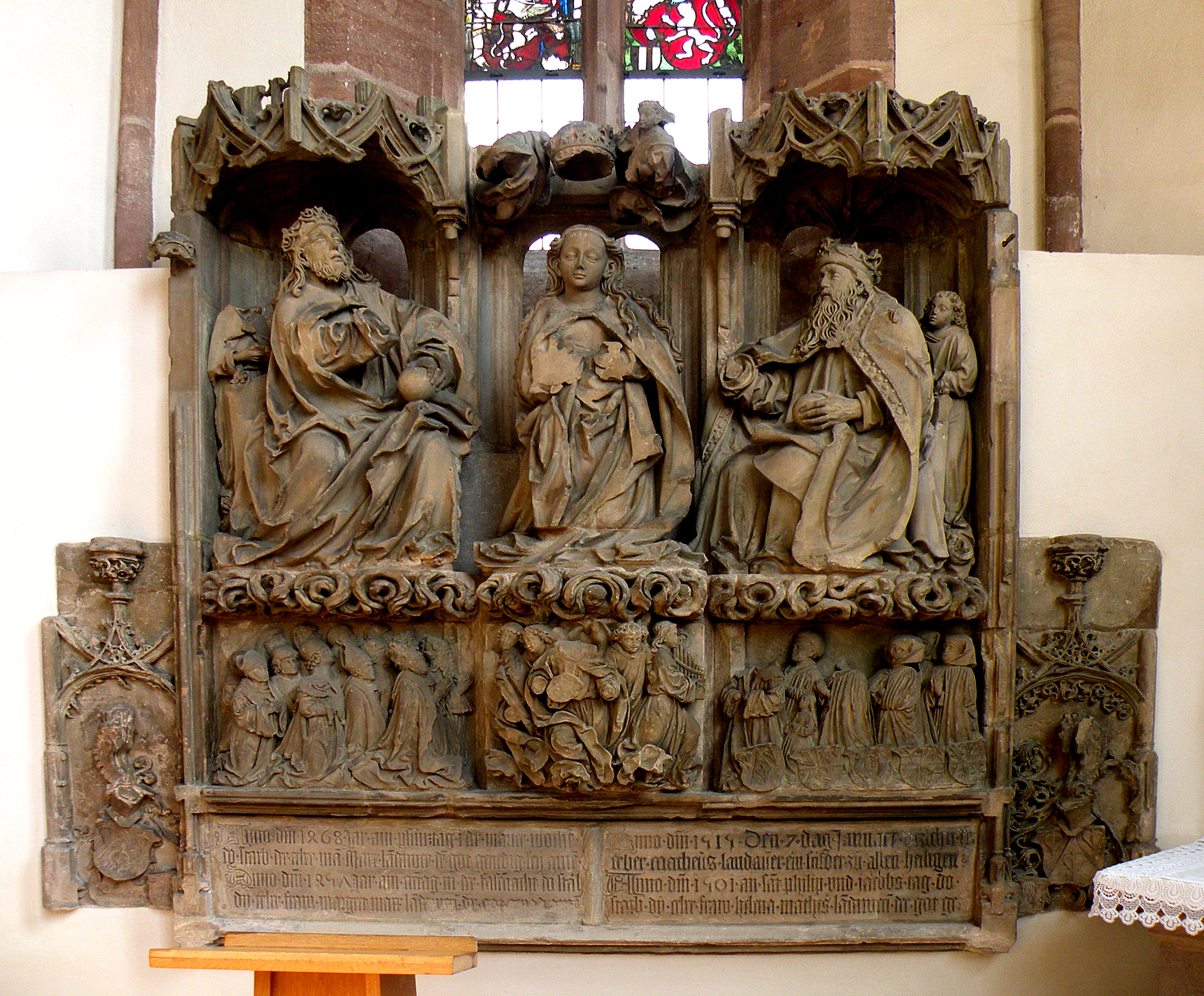 Адам_Крафт.__Алтарь_Тэтцель_капеллы._Нюрнберг.